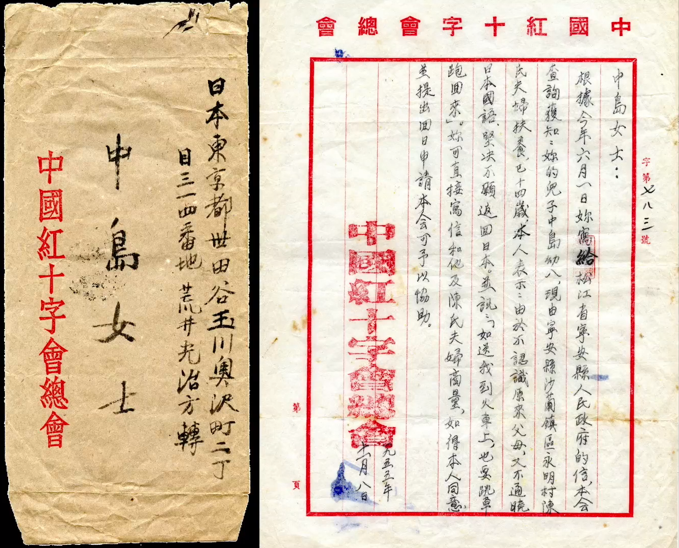 中國紅十字會總會覆中島女士函及信封